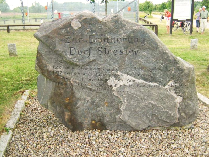 Gedenkstein für das im Zuge der „Aktion Ungeziefer“ geräumte und 1974 geschleifte Dorf Stresow in der Altmark. Heute befindet sich dort eine Grenzanlage mit Darstellung der damaligen Grenzanlagen. Landkreis Stendal, Gemeinde Aulosen.